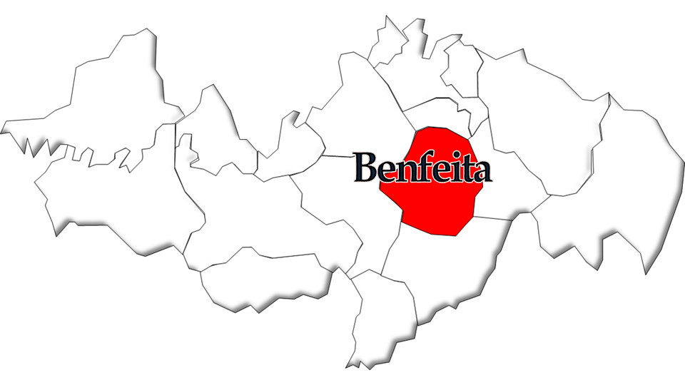 População